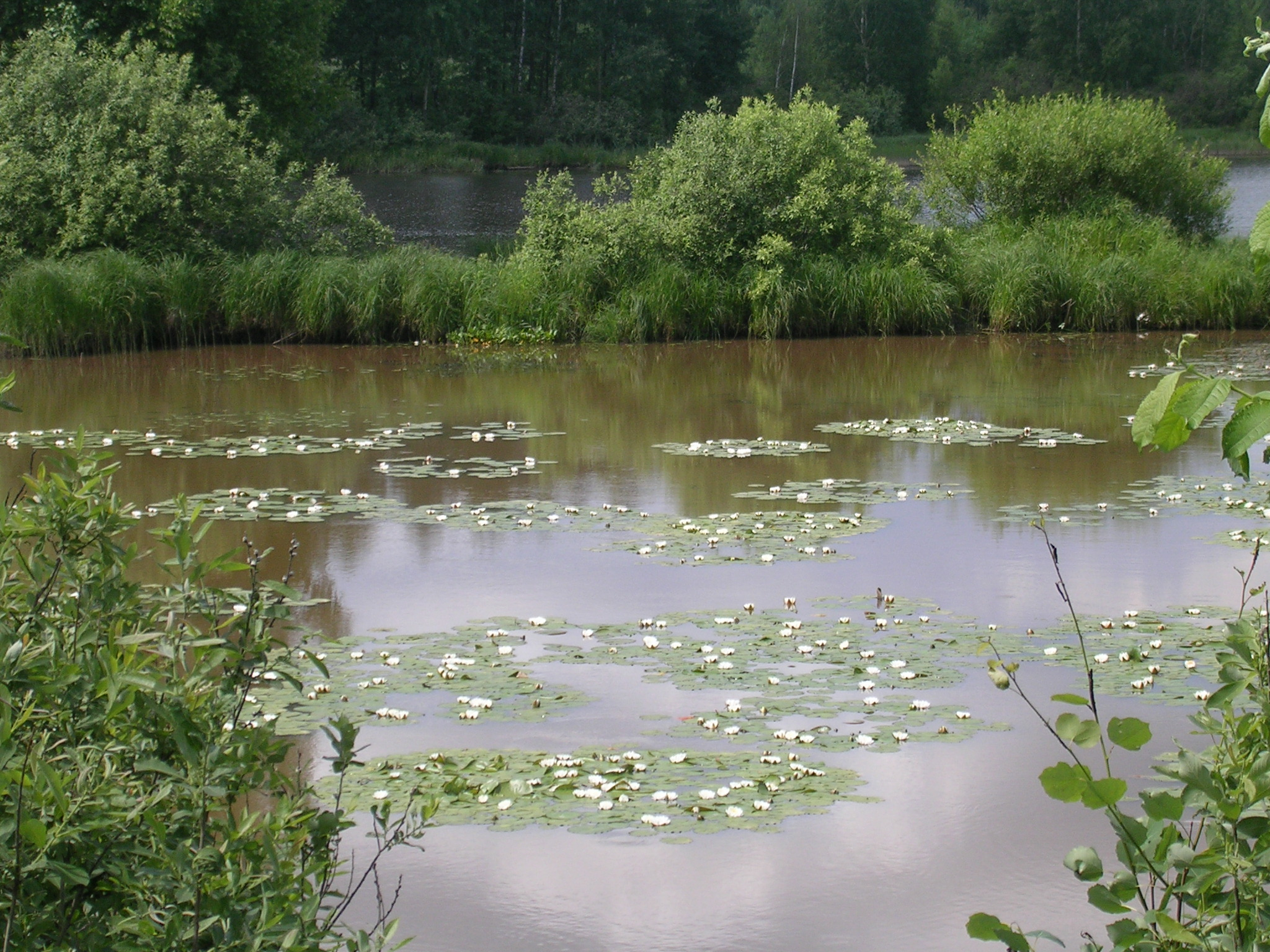 Summer pond on Dubenka river near Borovkovo